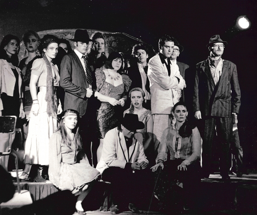 Christophe Colomb Supersta